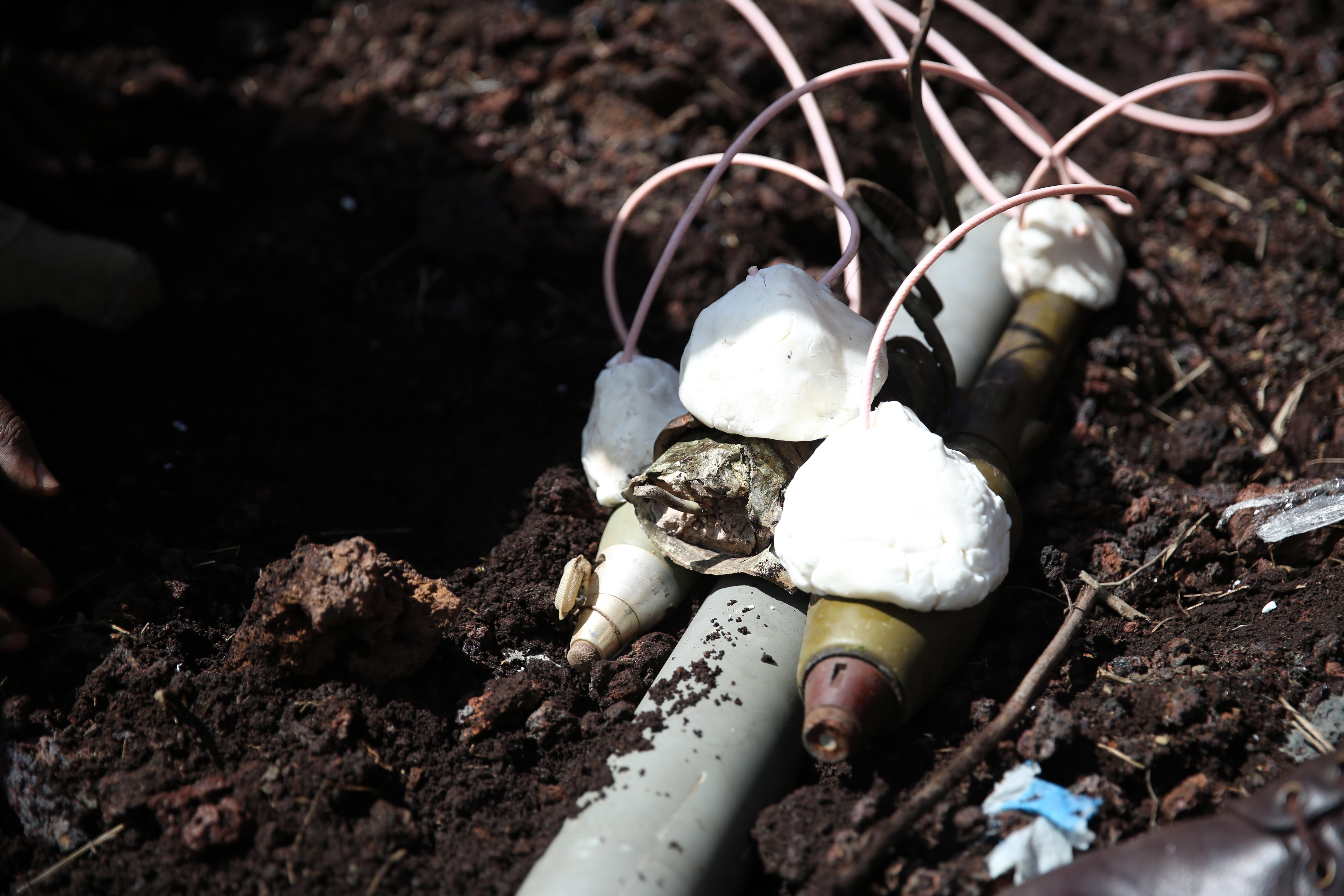 Photo MONUSCO / Abel Kavanagh